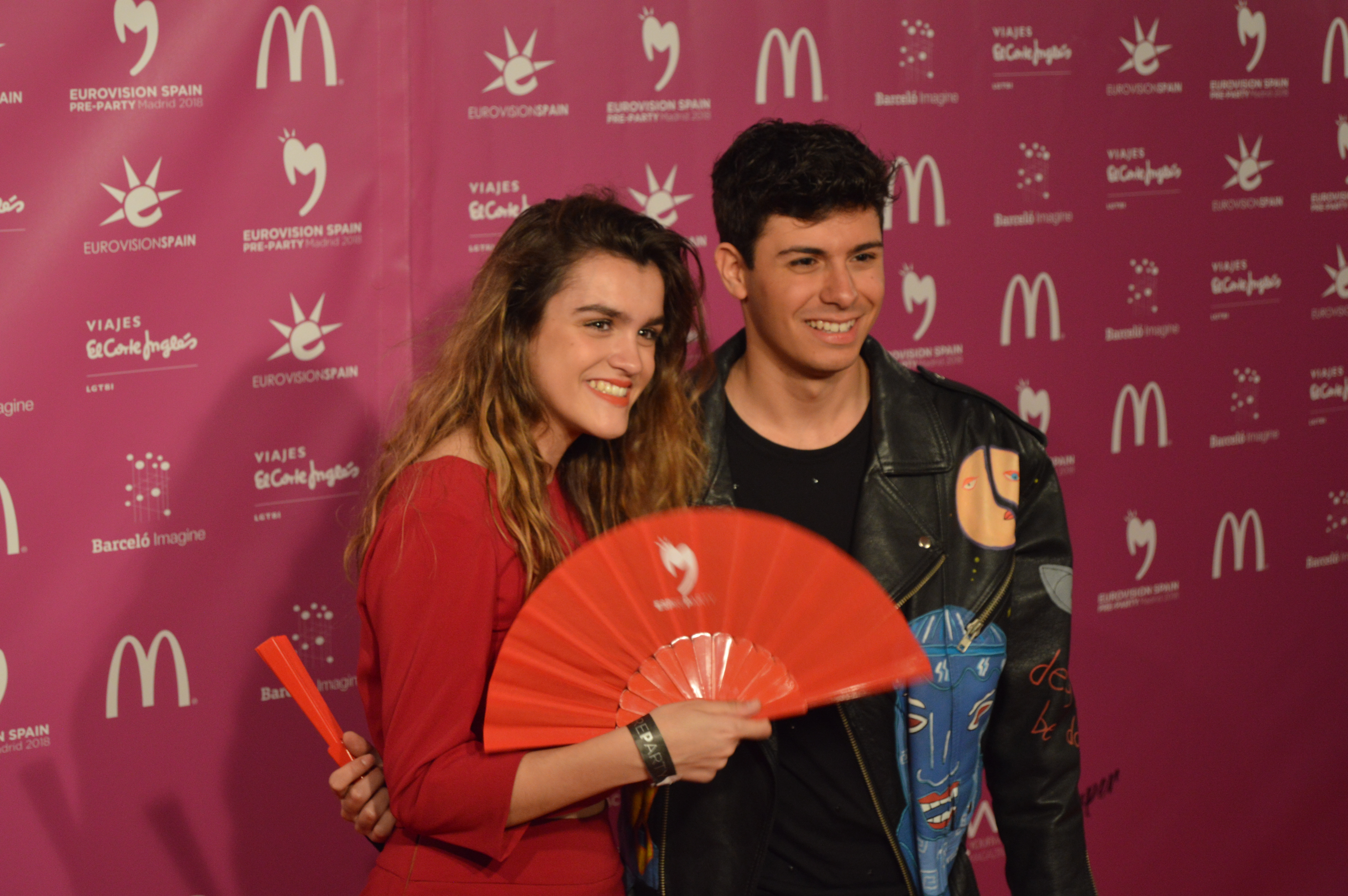 Alfred García y Amaia Romero posan para los medios en la Eurovision Spain PreParty en Madrid (Abril 2018)